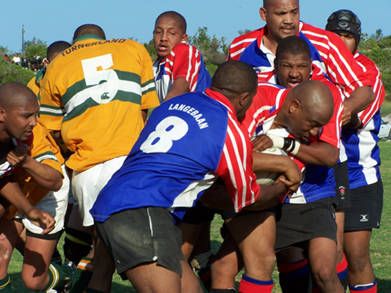 Rugby is een van die gewildste sportsoorte aan die Weskus. Hier spook Langebaan (in rooi en blou) sake uit teen Hopefield in 'n Bolandse ligawedstryd